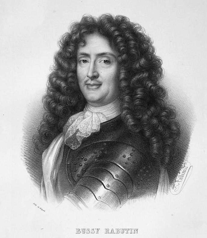 Roger de Rabutin, Comte de Bussy (1618 – 1693)